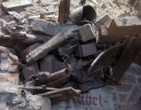 Beschreibung= Kellereinsturz im Zweiten Weltkrieg